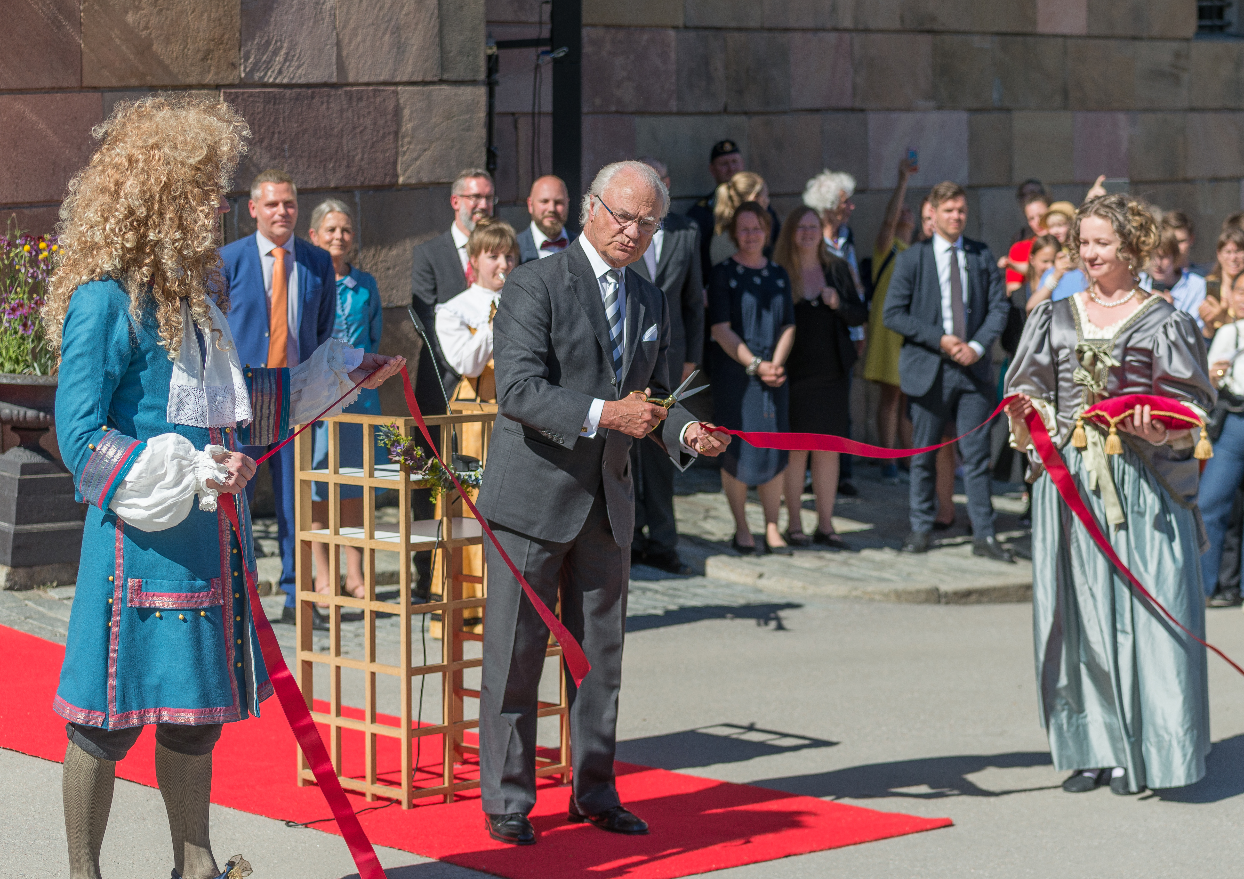 Carl XVI Gustaf nyinviger Livrustkammaren den 17 juni 2019 i närvaro av Carl XVI Gustaf och drottning Silvia.